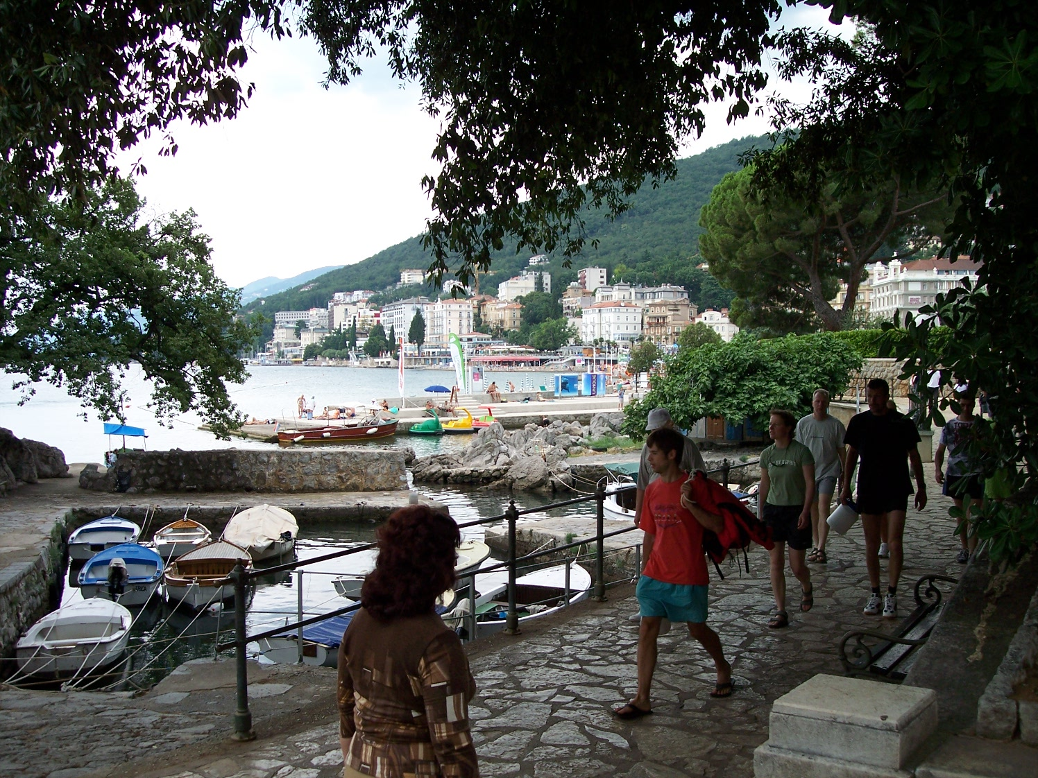 Opatija (Croatia)